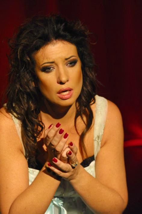 Alicja Węgorzewska-Whiskerd - premiera Diva for Rent. Monodram wyprodukowany przez fundację artystki StartSamrt